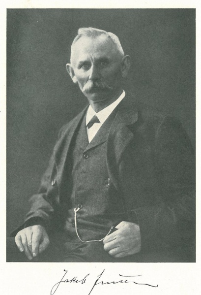 Jakob Jensen (1858-1942), Borgmester i Århus